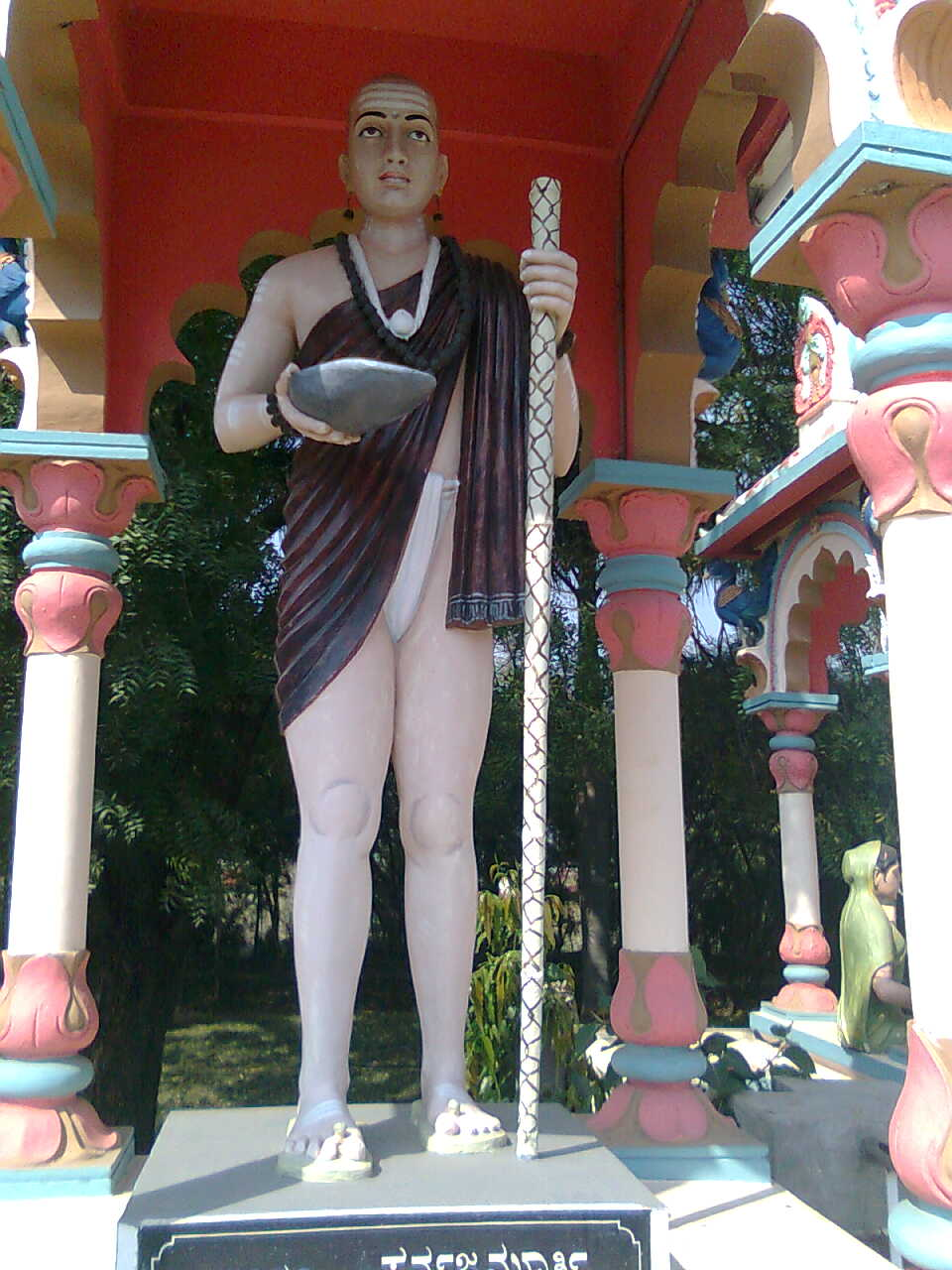 Sarvagna Mahakavi